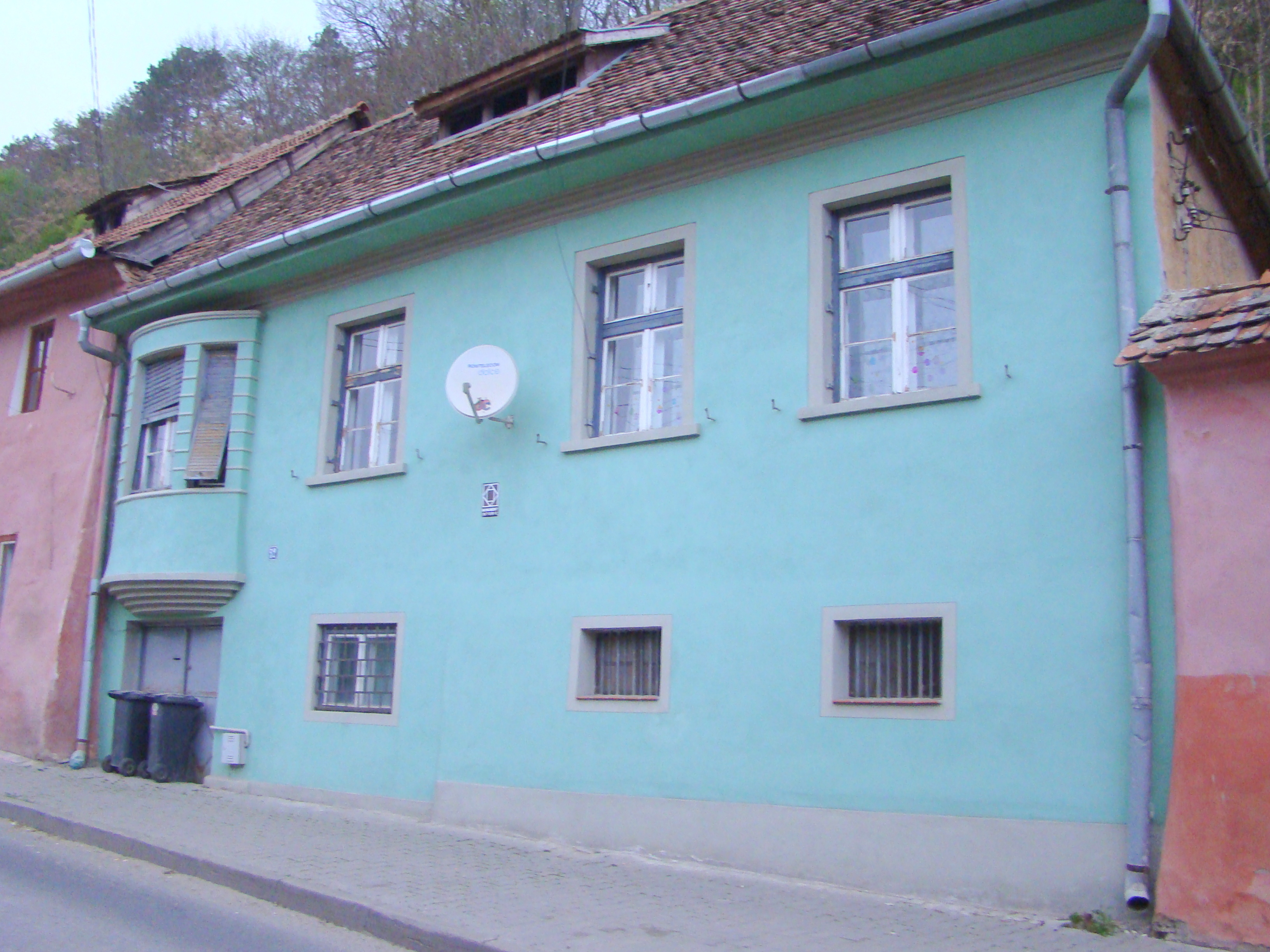 Casă, municipiul Sighișoara, str. Chendi Ilarie 52 sec. XIX